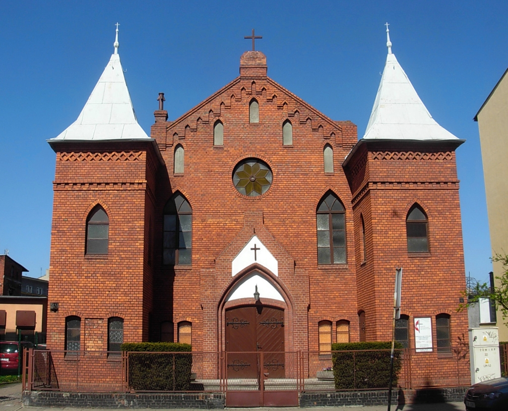 Kościół Ewangelicko-Metodystyczny przy ul. Pomorskiej 41 w Bydgoszczy